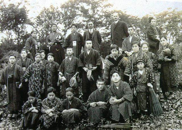 高瀬露23歳の時の集合写真（1924年10月19日）